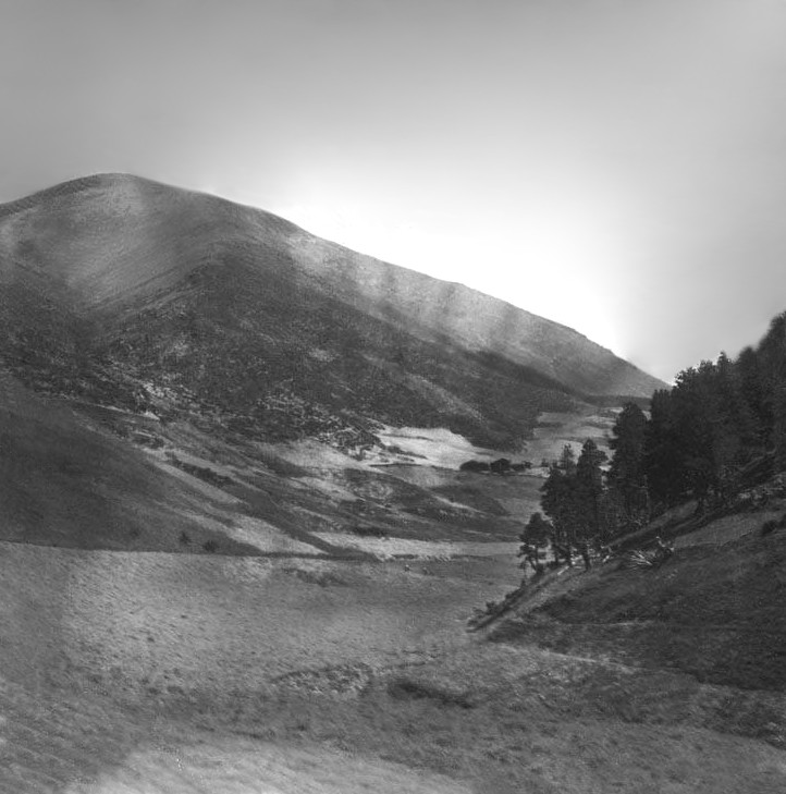 Imatge